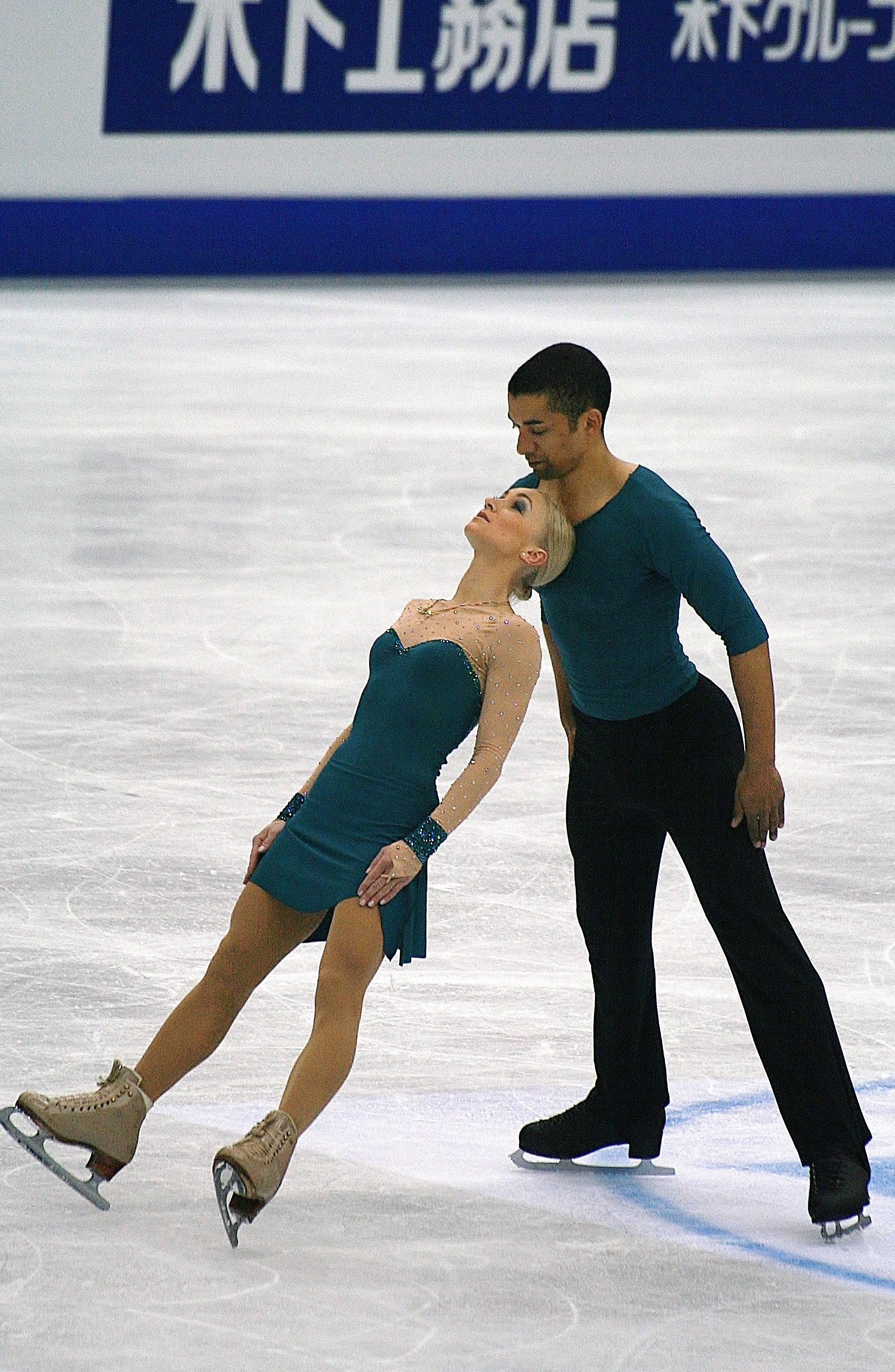 Алёна Савченко и РОбин Шолковы (Германия) на чемпионате мира по фигурному катанию 2012